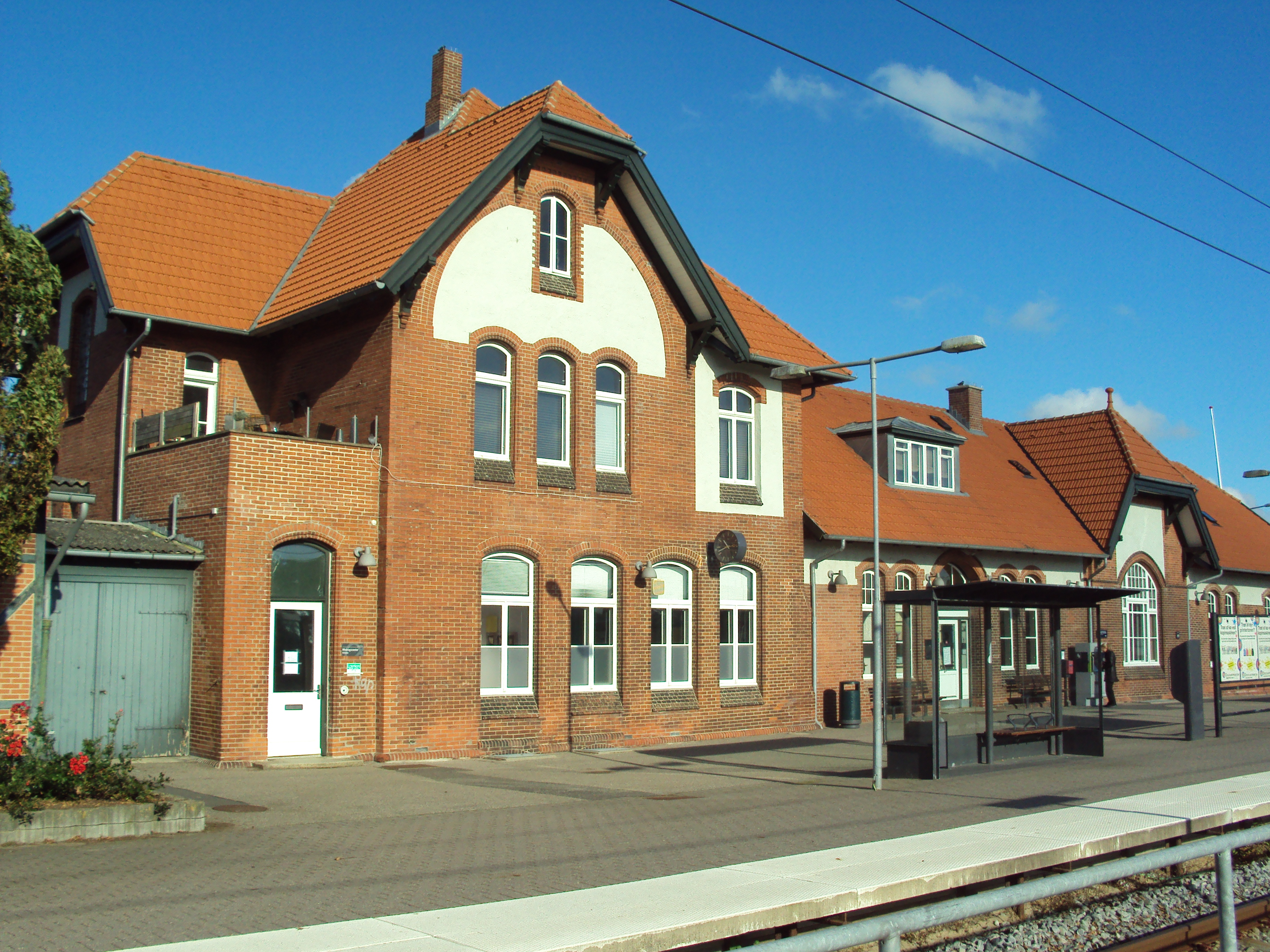 Gråsten Station